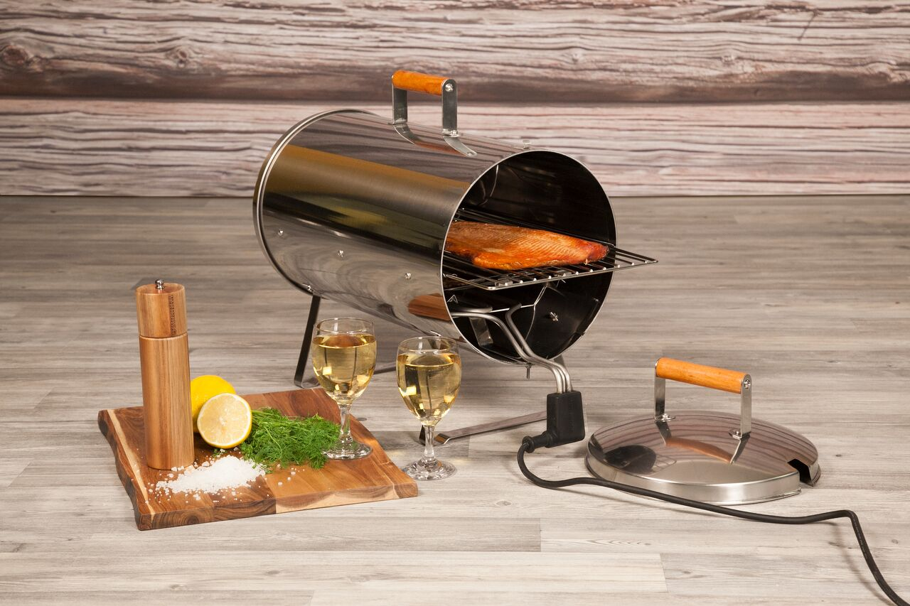 Muurikka elektriskā kūpinātava W1100